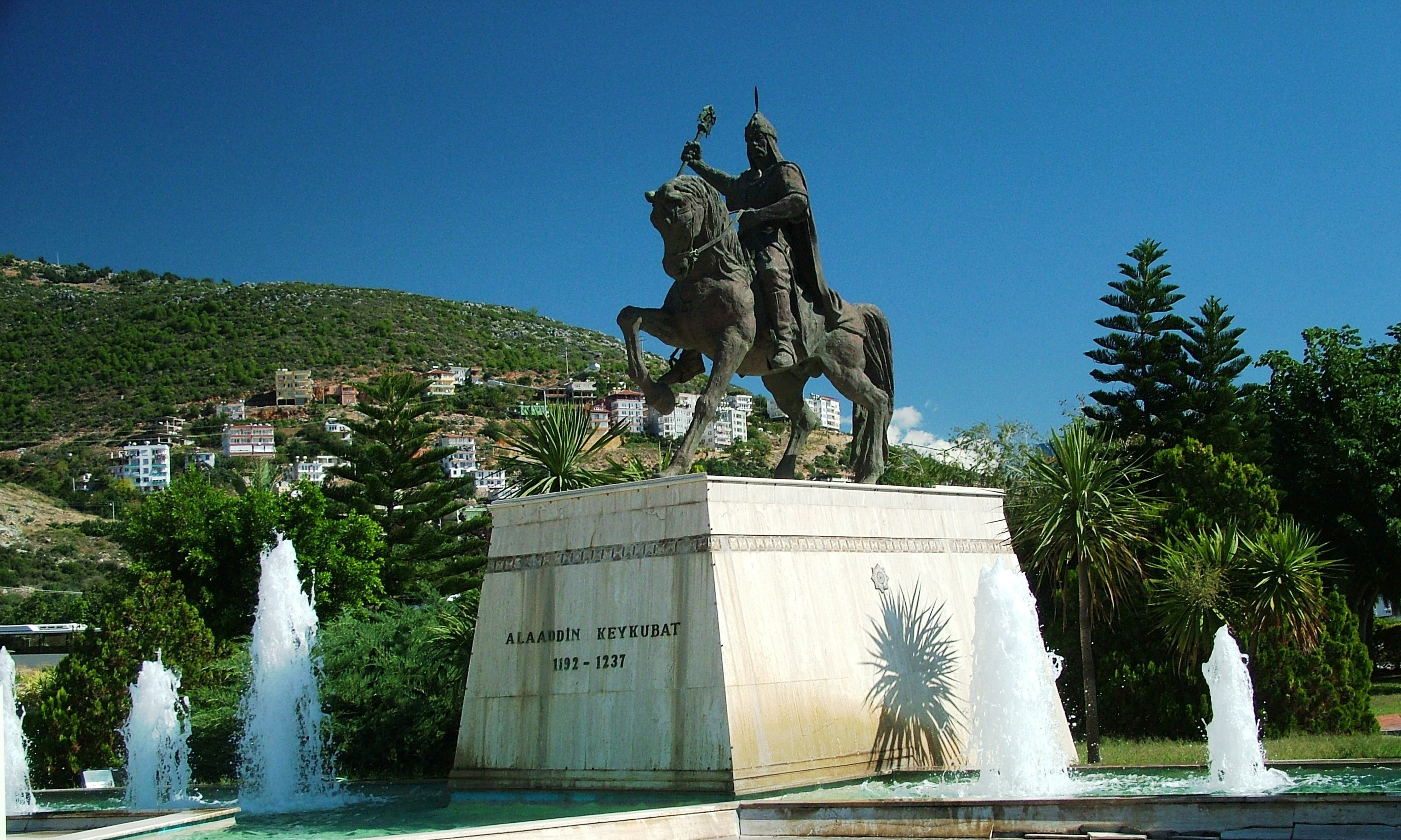 Alâeddin Keykubad lovasszobra (Alanya, Törökország)